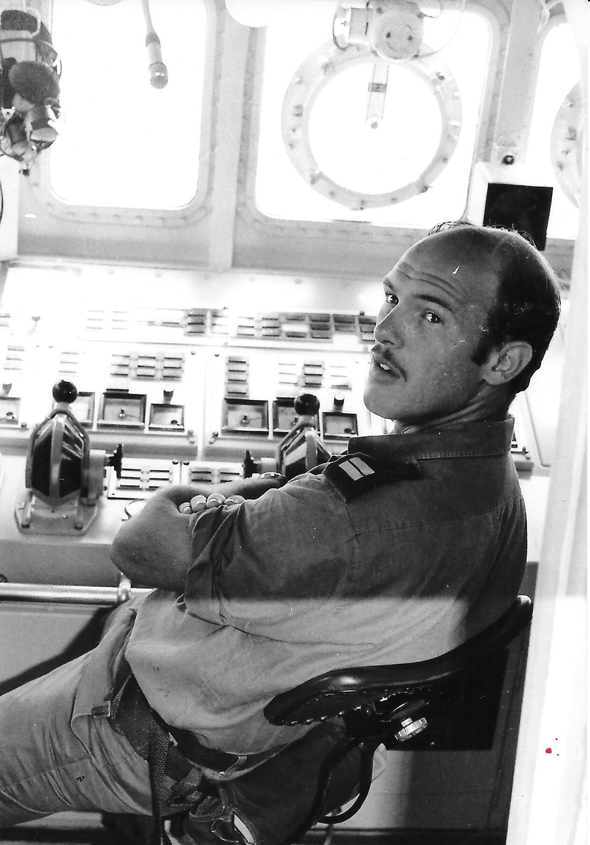 סגן אלכס איל קצין הגנ"ק באח"י קשת במלחמת יום הכיפורים